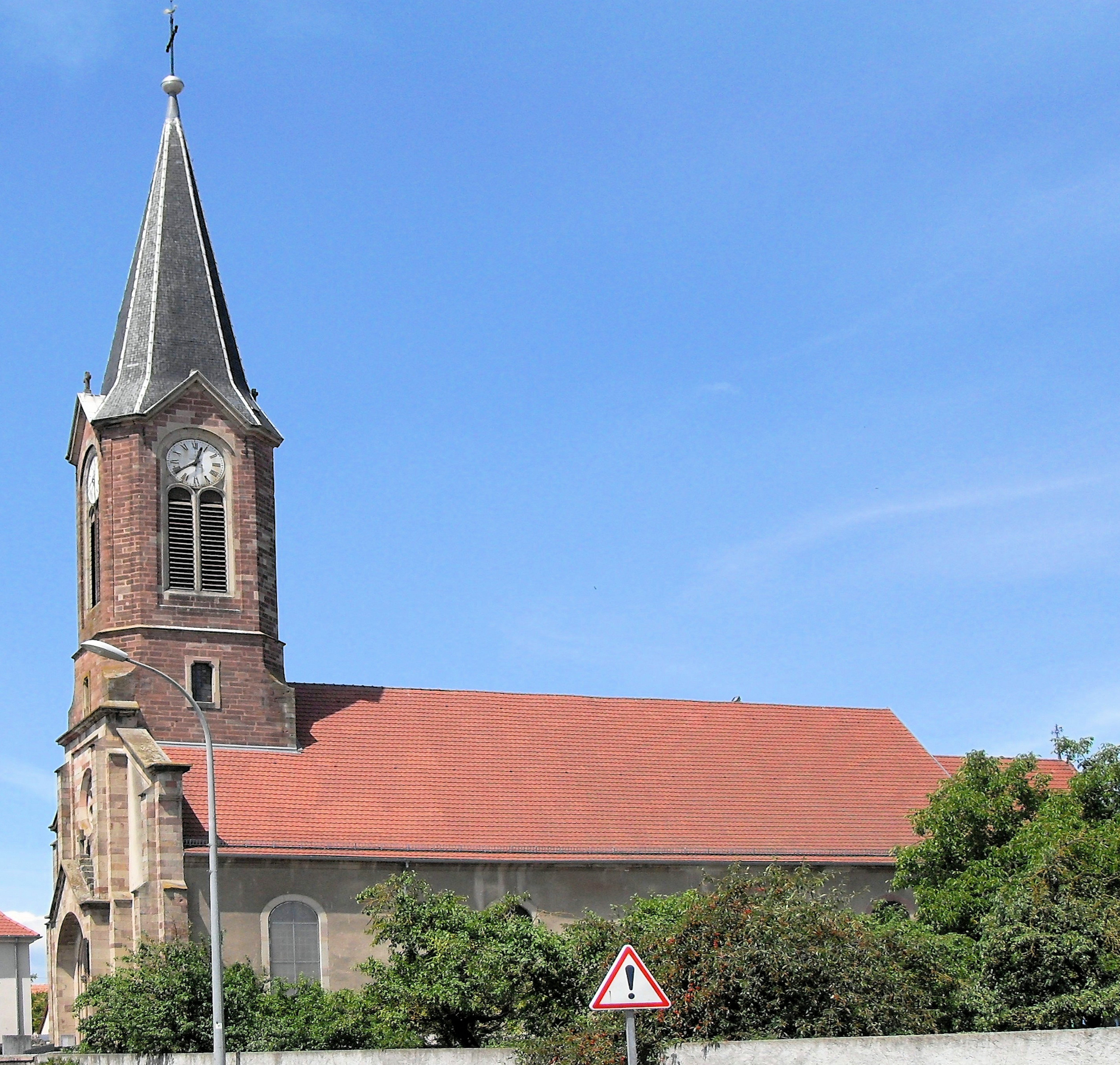 L'église Saint-Gall d'Obersaasheim